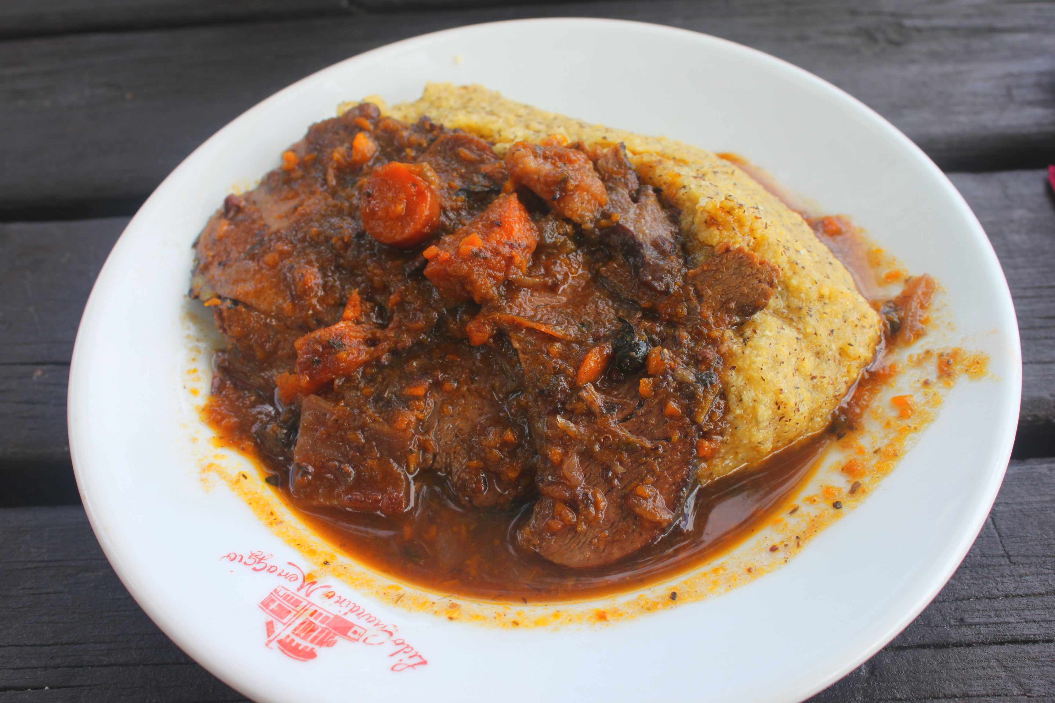 Polenta con Carne im Rifugio Menagio